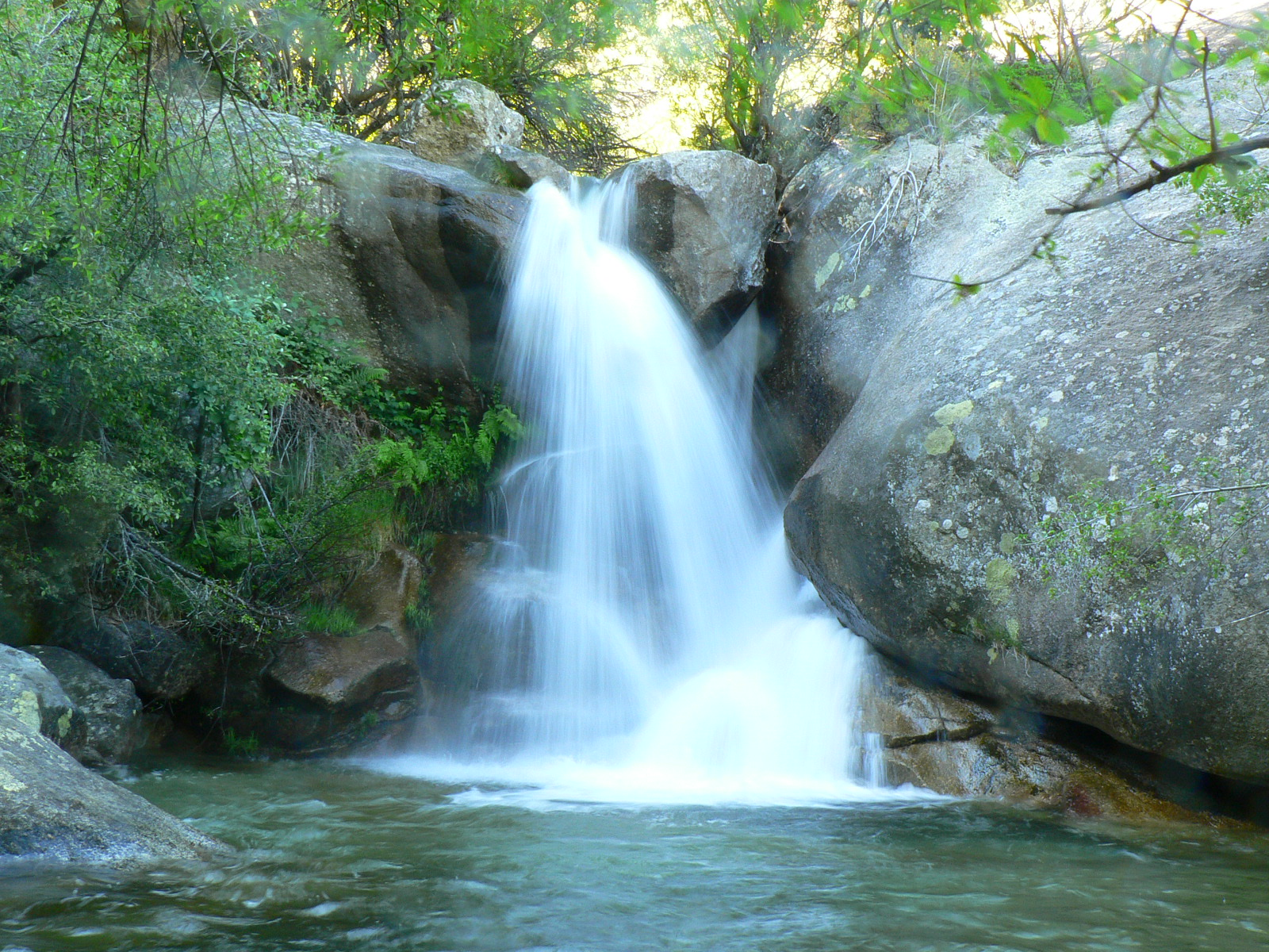 Bella cascada producida por el río Manzanares en su curso alto. La Pedriza.